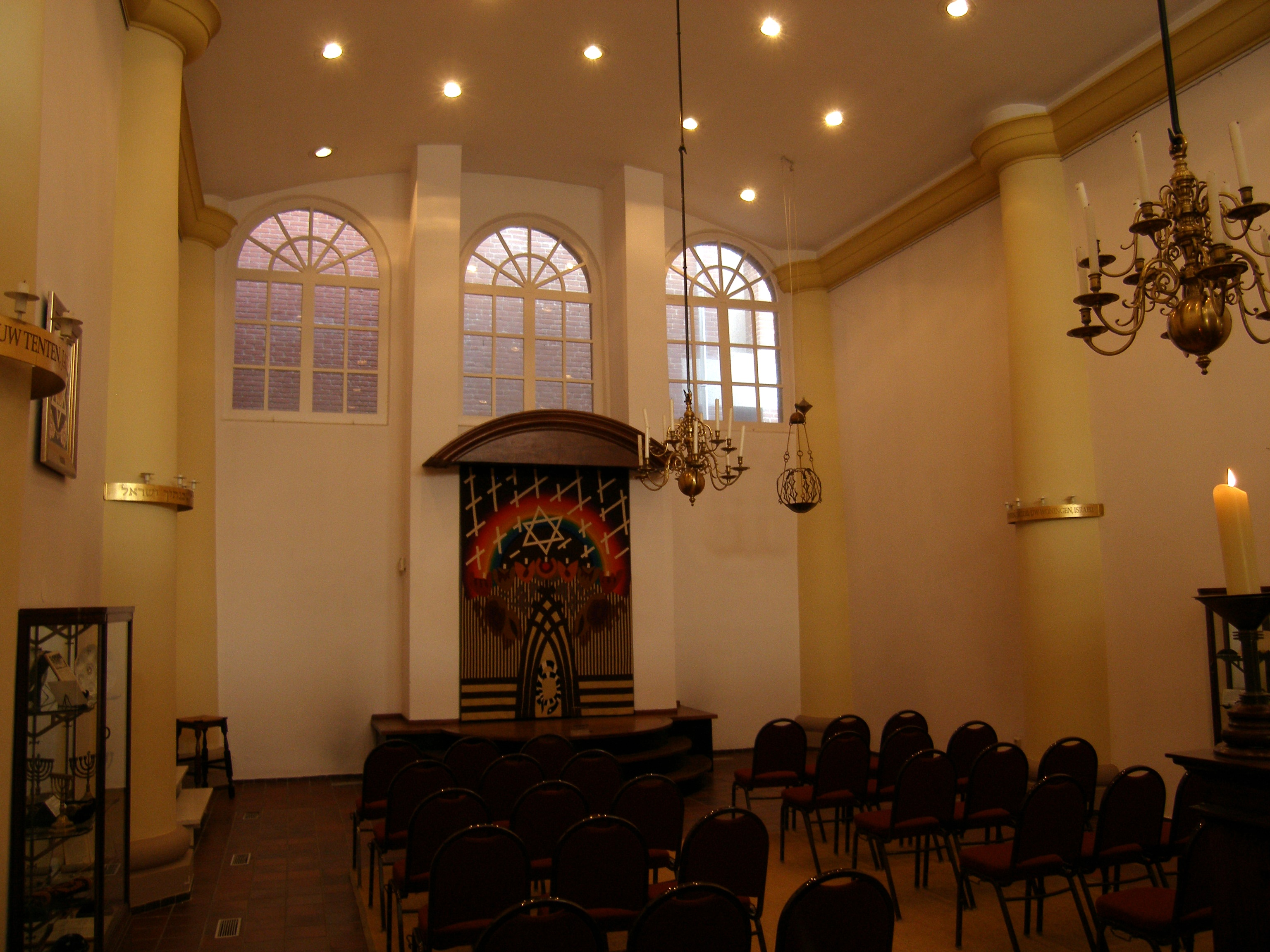 Synagoge at Koevoetstraat 39, Bergen op Zoom. Built 1832. Its national-monument number is 9181.